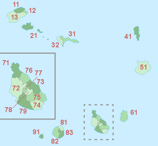 Cabo verde, mapa, municípios (numerados). Actualizado de e